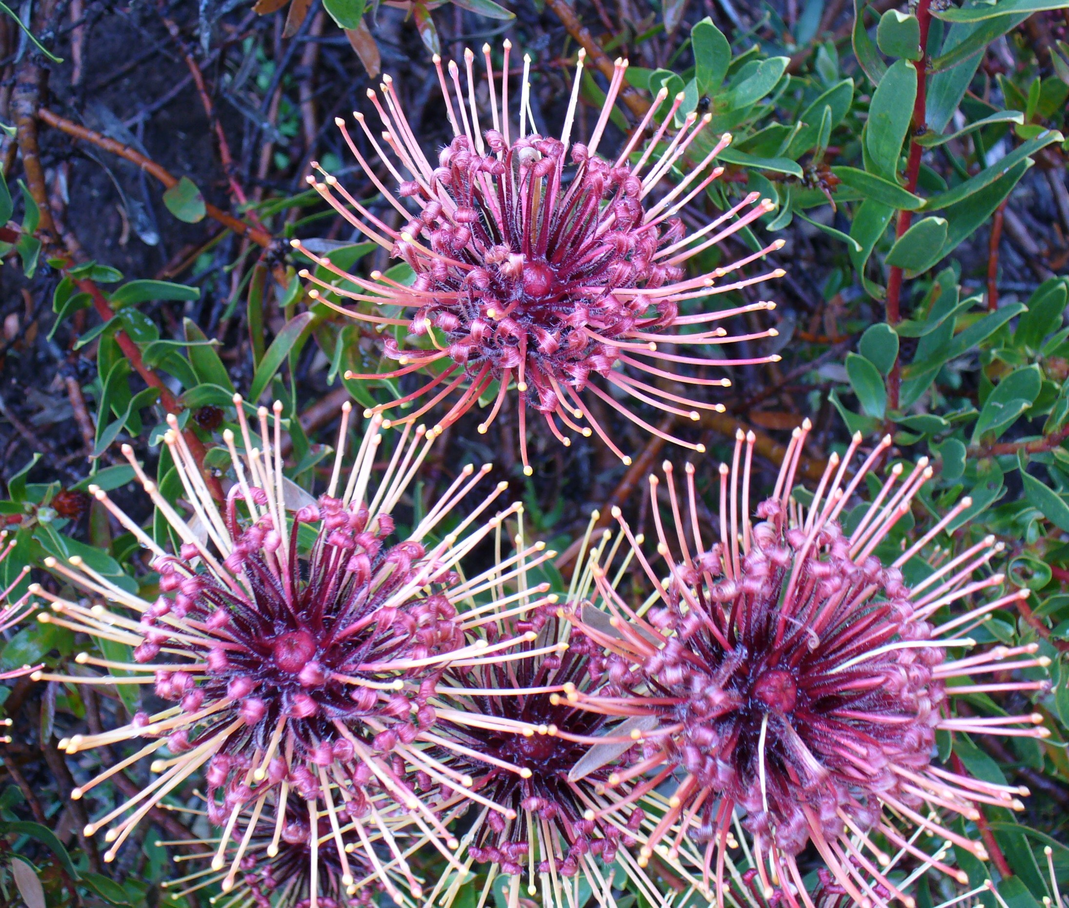 Leucospermum tottum var. galbrum flower